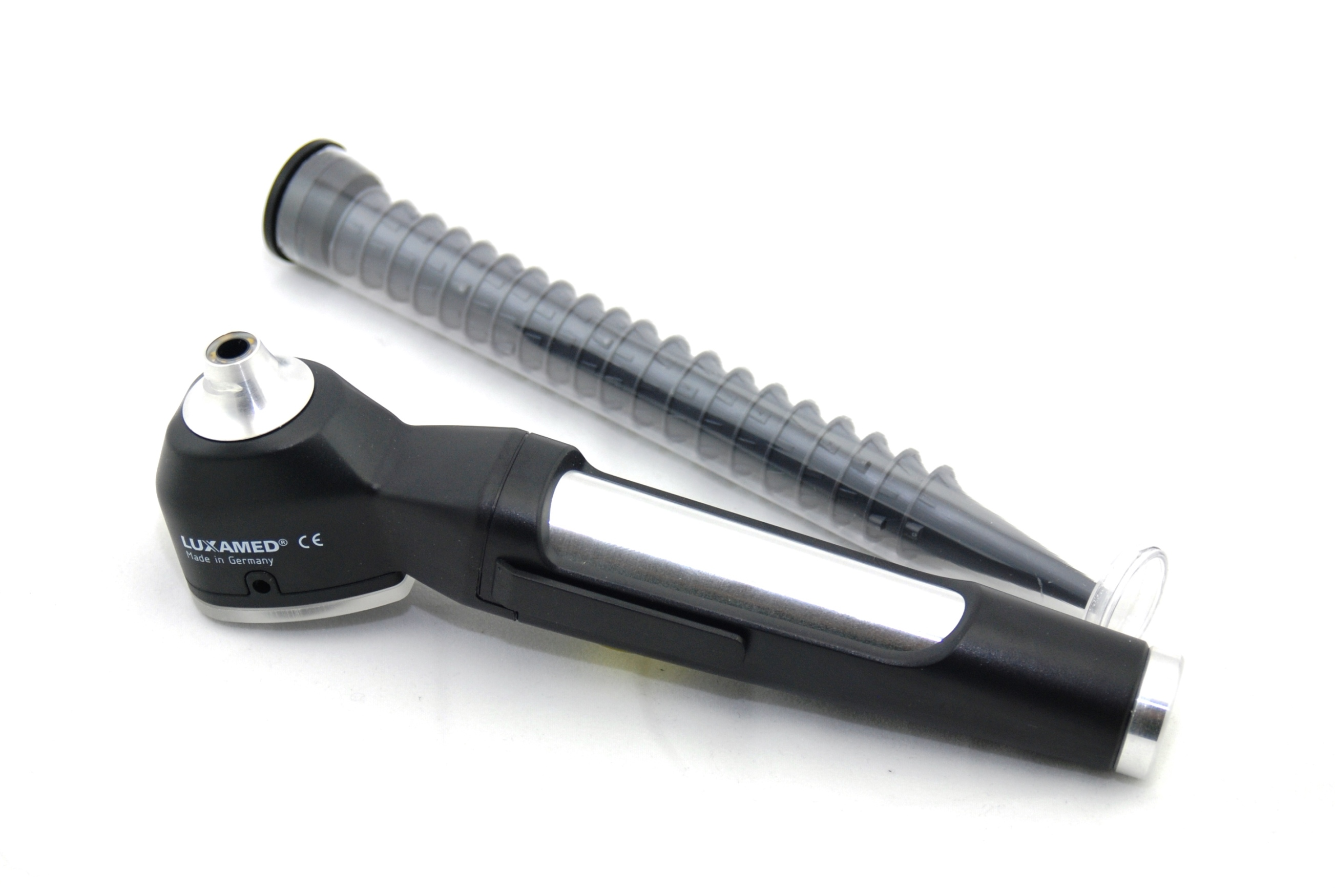 Otoskop dargestellt mit den benötigten Ohrtrichtern.